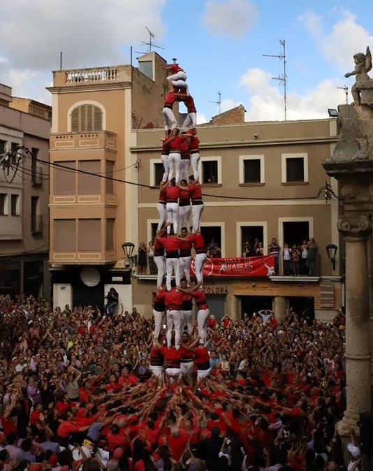 4 de 9 sense folre descarregat per la CJXV a la fira de Santa Teresa del Vendrell, any 2018.